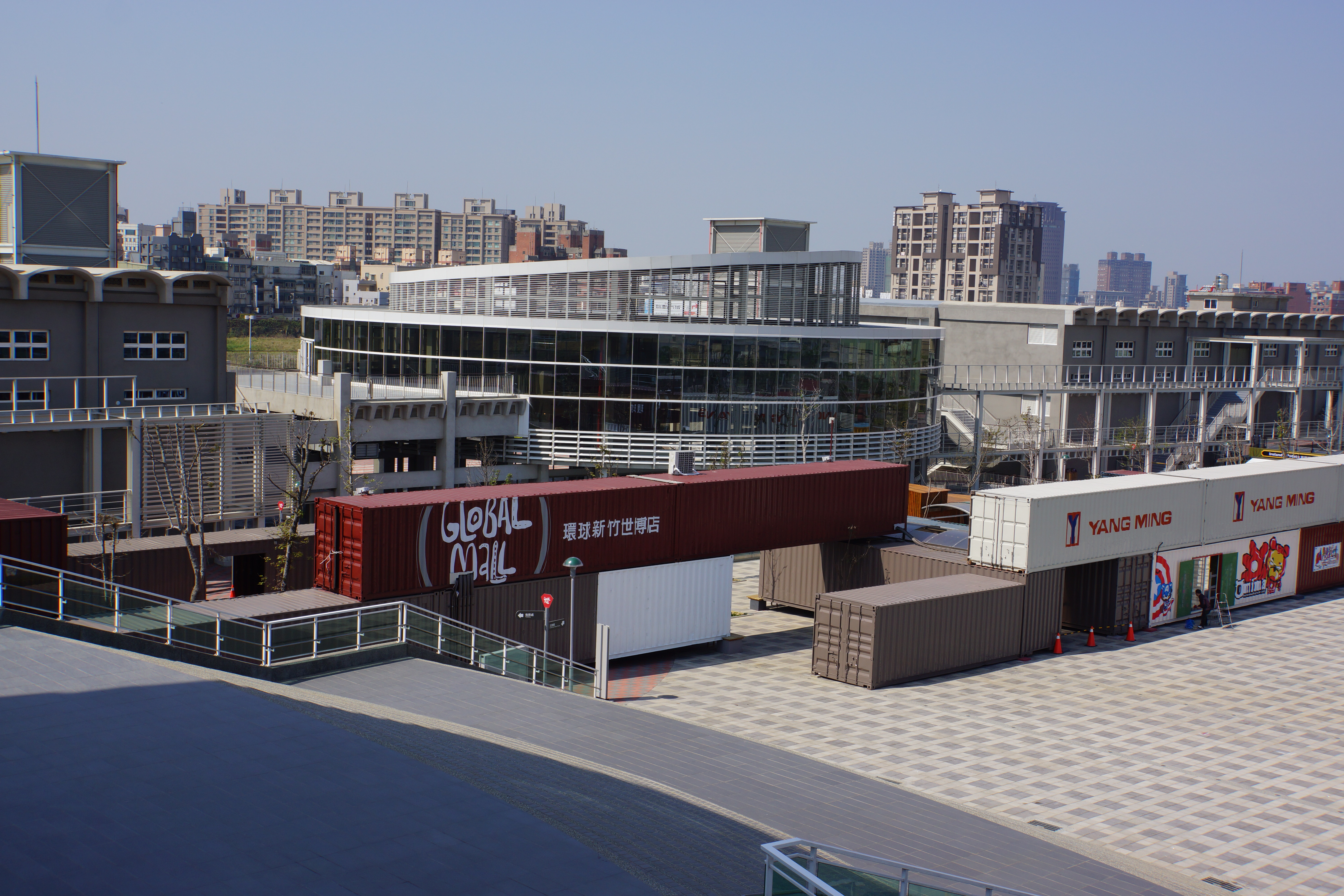 環球購物中心新竹世博店